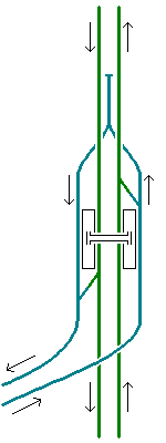 Moskva metroostacio Kaŝirskaja Mi, aŭtoro de la bildo, permesas al ĉiuj uzi ĝin kun ĉi tiuj kondiĉoj